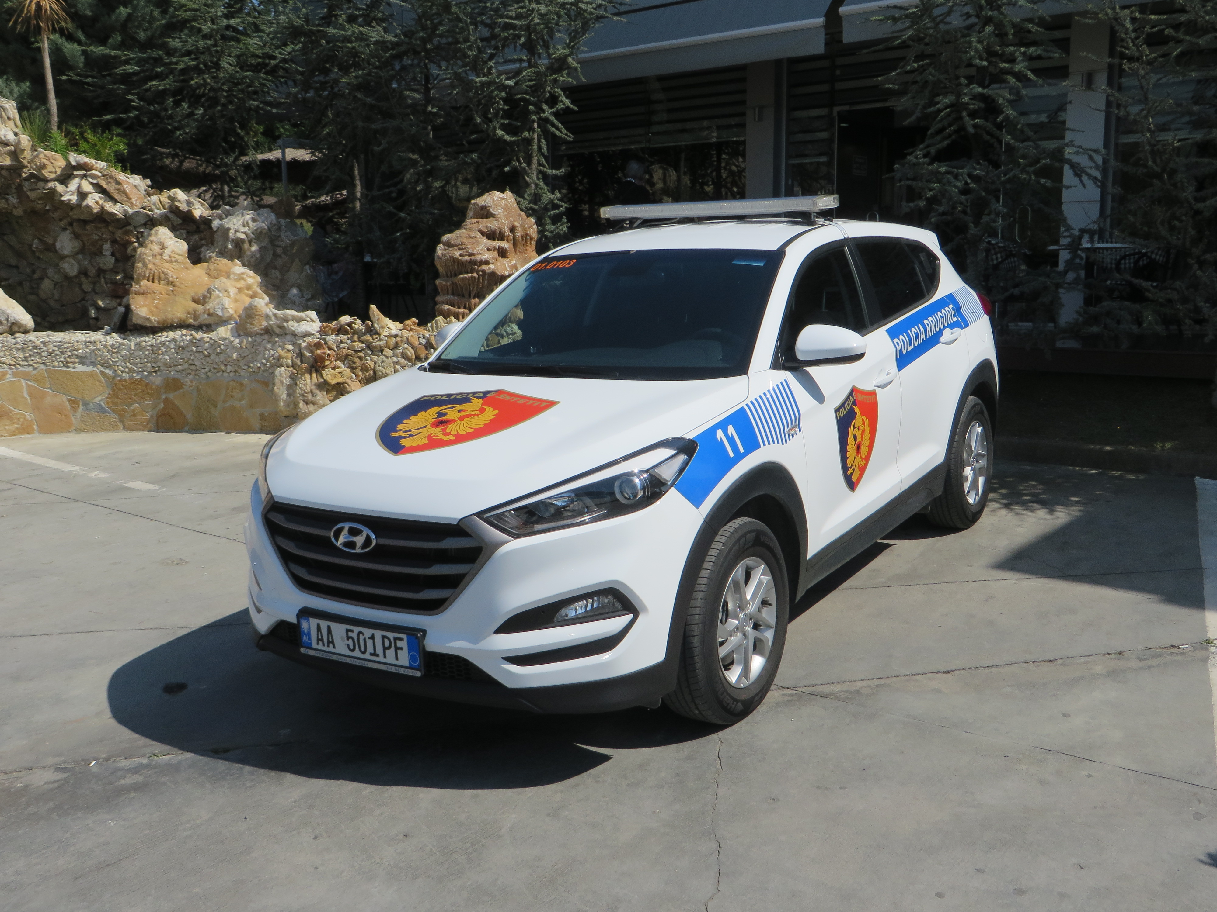 Hyundai Tucson - Albanese politie auto